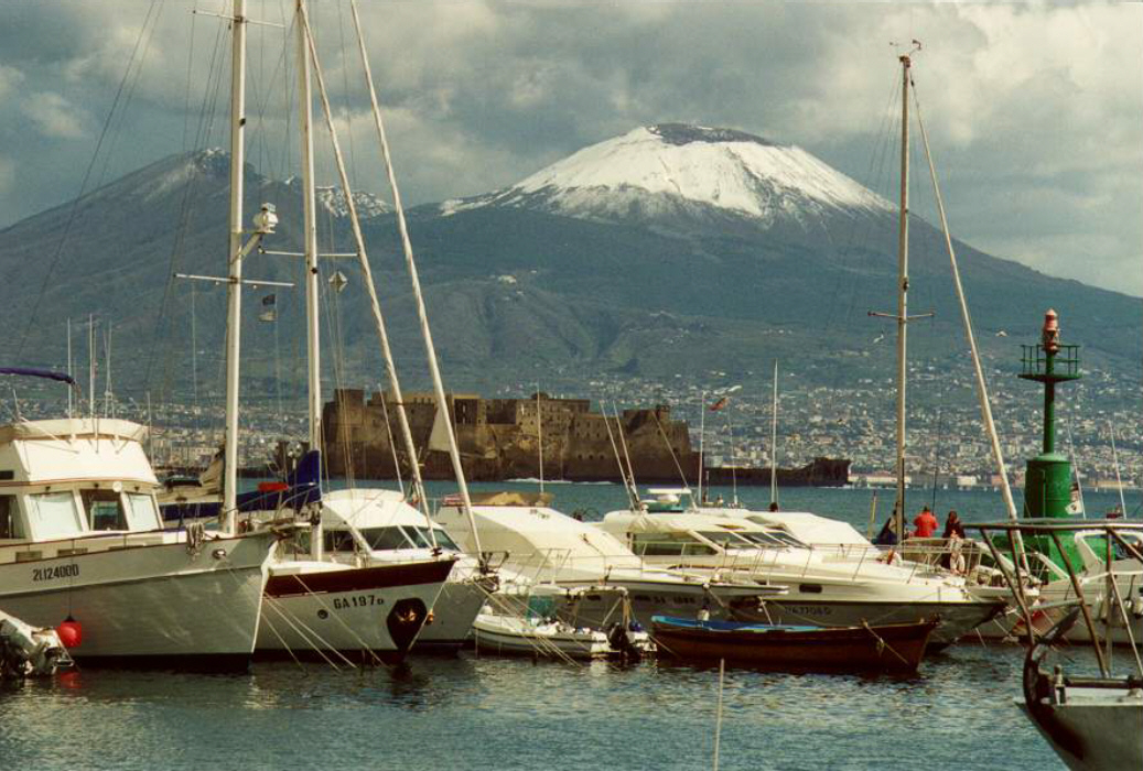 Vesuvio da Mergellina in Napoli. Sotto, Castel dell'Ovo